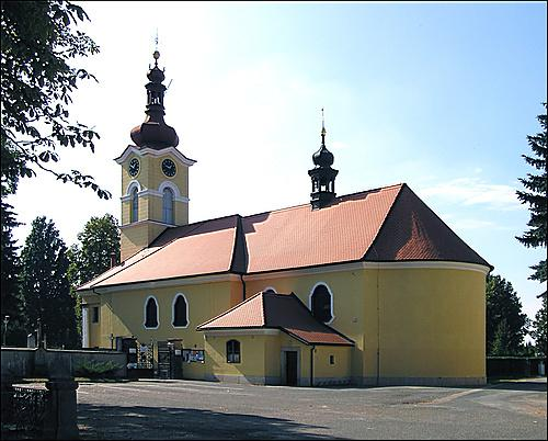 kostel sv.Petra a Pavla v Puchově, Hradec Králové